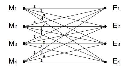 Пример графа Шеннона совершенно секретной системы. Mi=1..4 - исходные сообщения; Ei=1..4 криптограммы; нумерация дуг графа соответствует нумерации ключей (1..4).